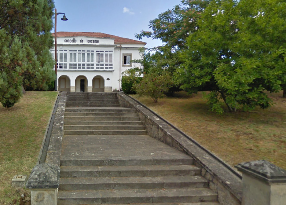 Casa consistorial de Lousame, no lugar de Portobravo